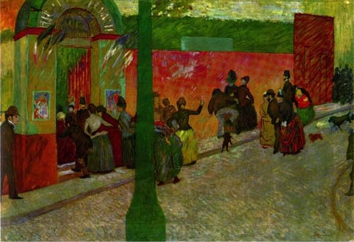 moulin de la galettetitle QS:P1476,fr:"moulin de la galette" label QS:Lfr,"moulin de la galette"